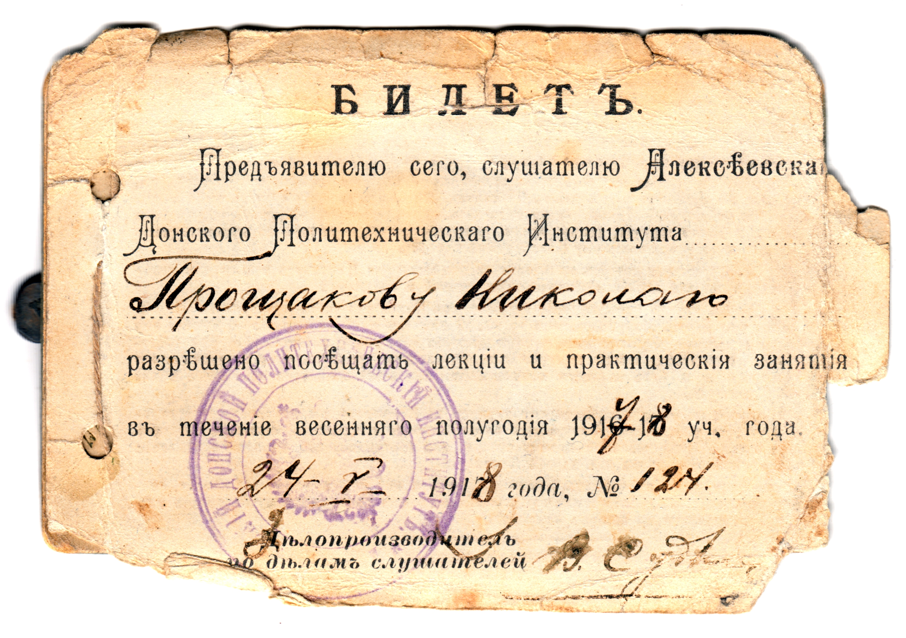 Студенческий билет Донского политехнического института, 1917